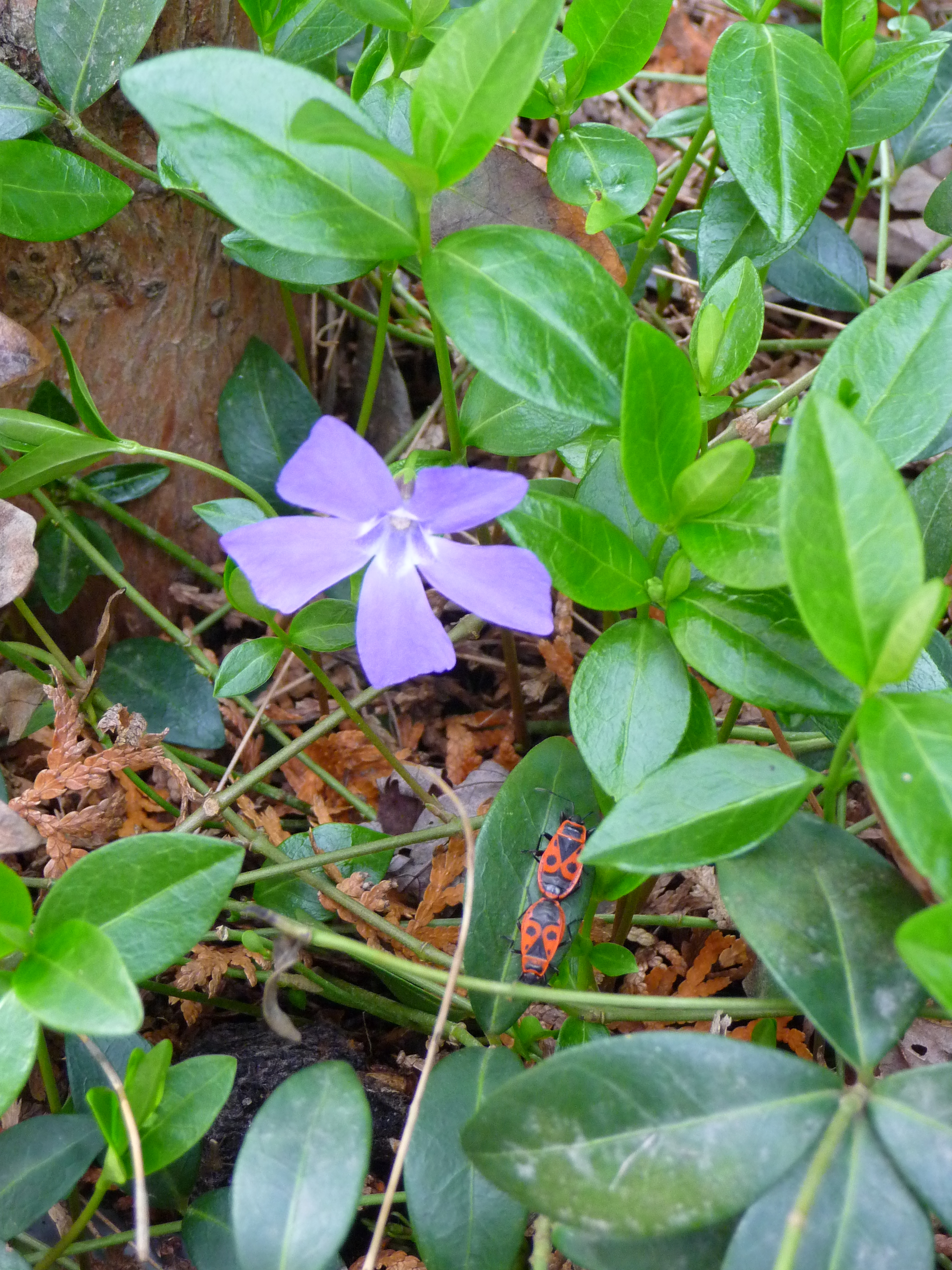 Feuerwanzen (Pyrrhocoridae) auf Immergrün Vinca minor, fotografiert in Baden-Württemberg (Deutschland)